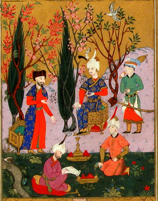 Secaatname 0243